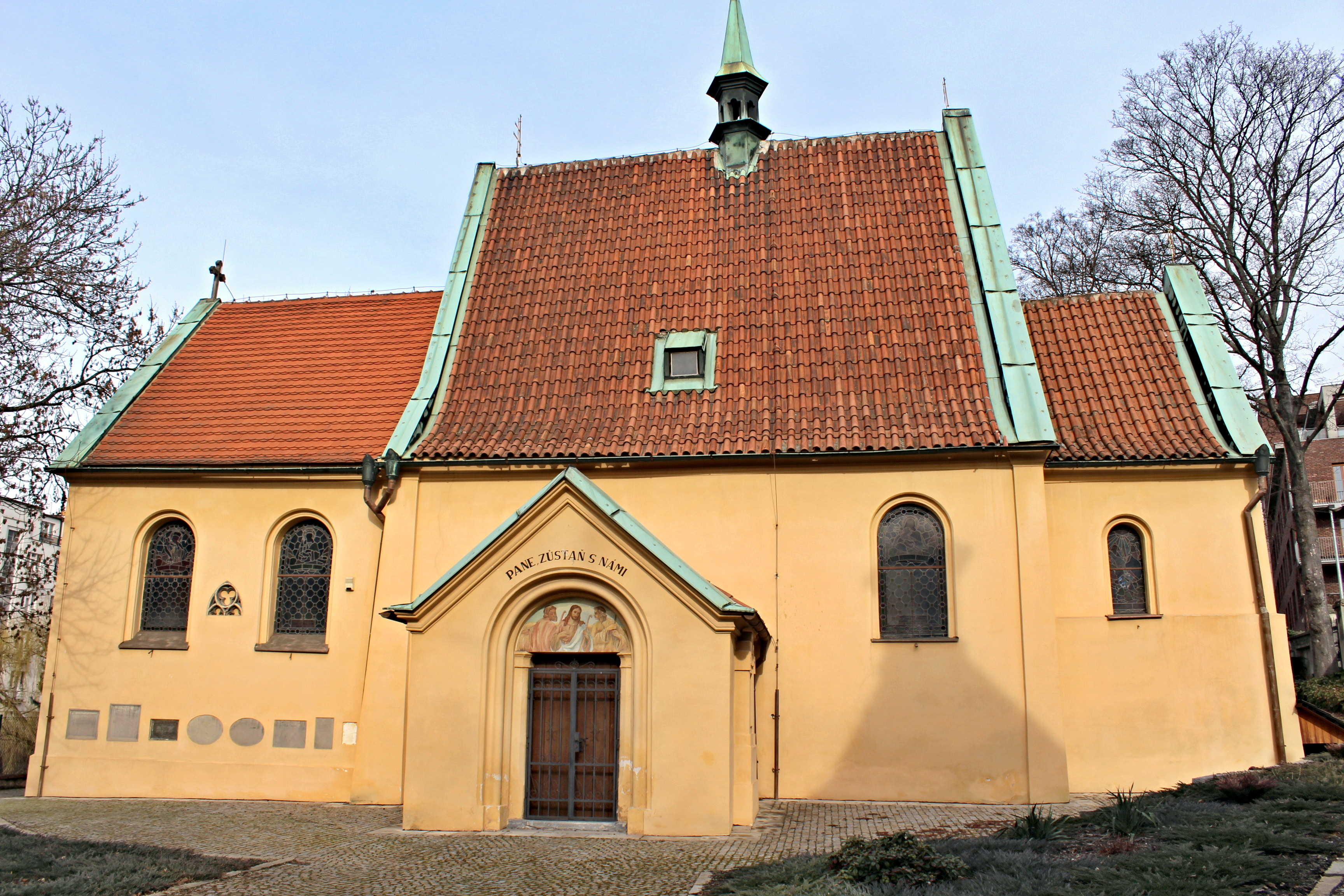 Kostel sv. Michaela archanděla v Podolí